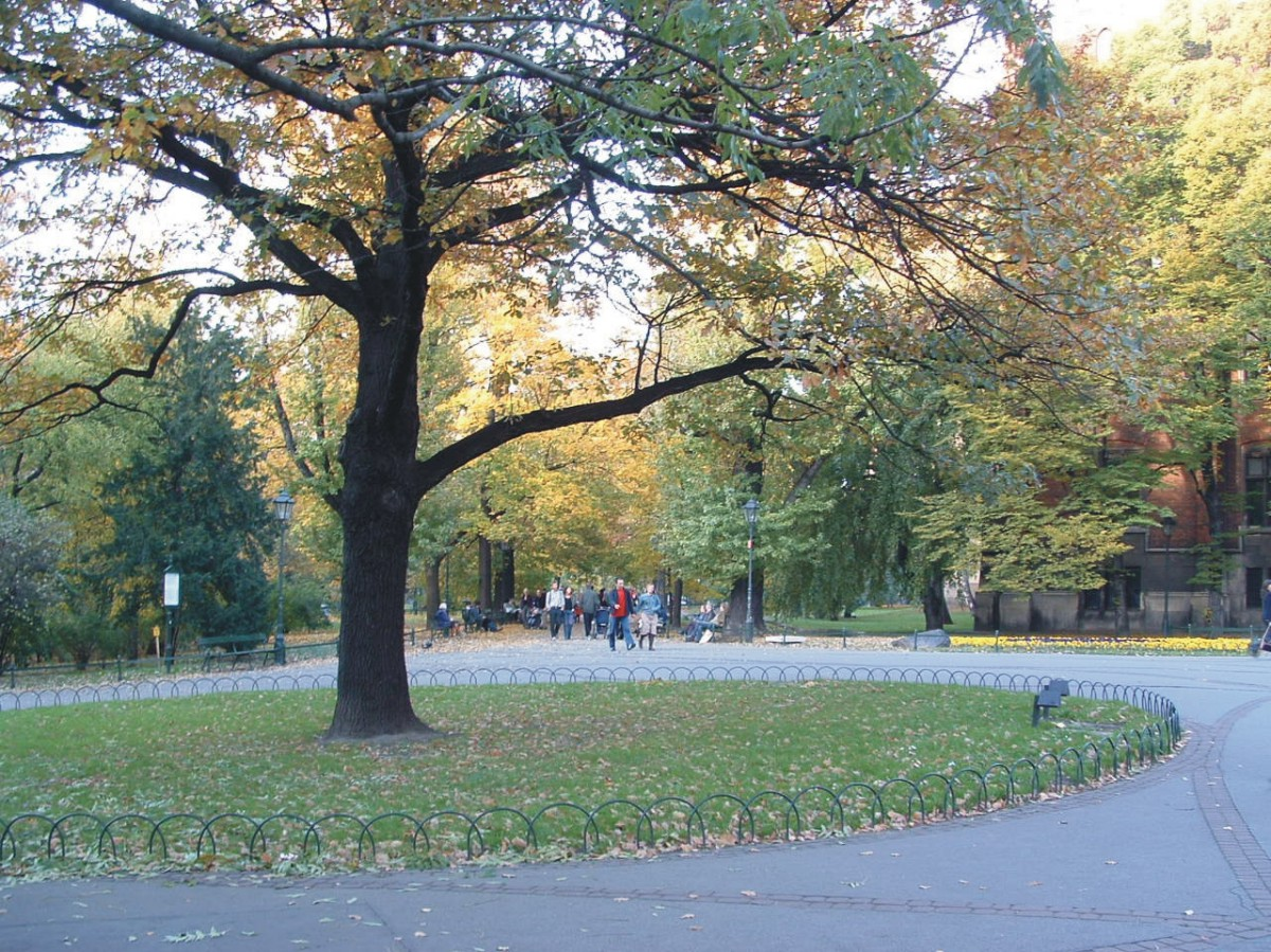 Park Planty w Krakowie